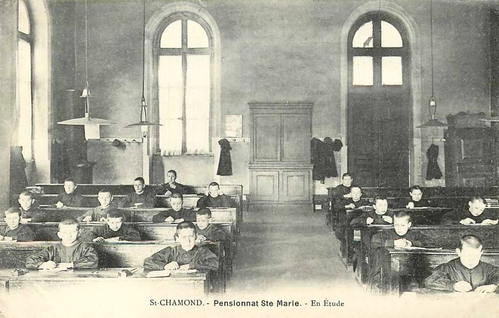 Pensionnat du collège Sainte-Marie à Saint-Chamond, carte postale ancienne.